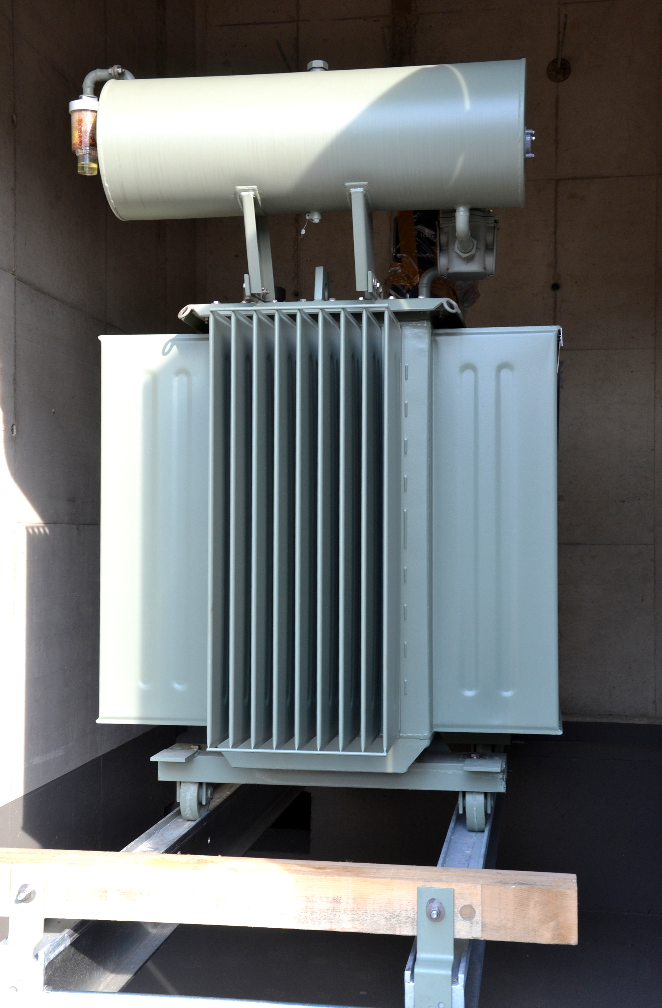 Transformator des Biomasseheizkraftwerkes Steyr; 400v/20 kV; 1600 kVA; Gesamtgewicht 3800 kg; Ölgekühlter Transformator mit Gehäuse; man erkennt seitlich und an der Vorderseite die Konvektionswärmetauscher, in welchen die Wärme an die Umgebungsluft abgegeben wird. Unter dem Wärmetauscher ist die Ölauffangwanne angeordnet (mit dem dunklen ölfesten Anstrich).